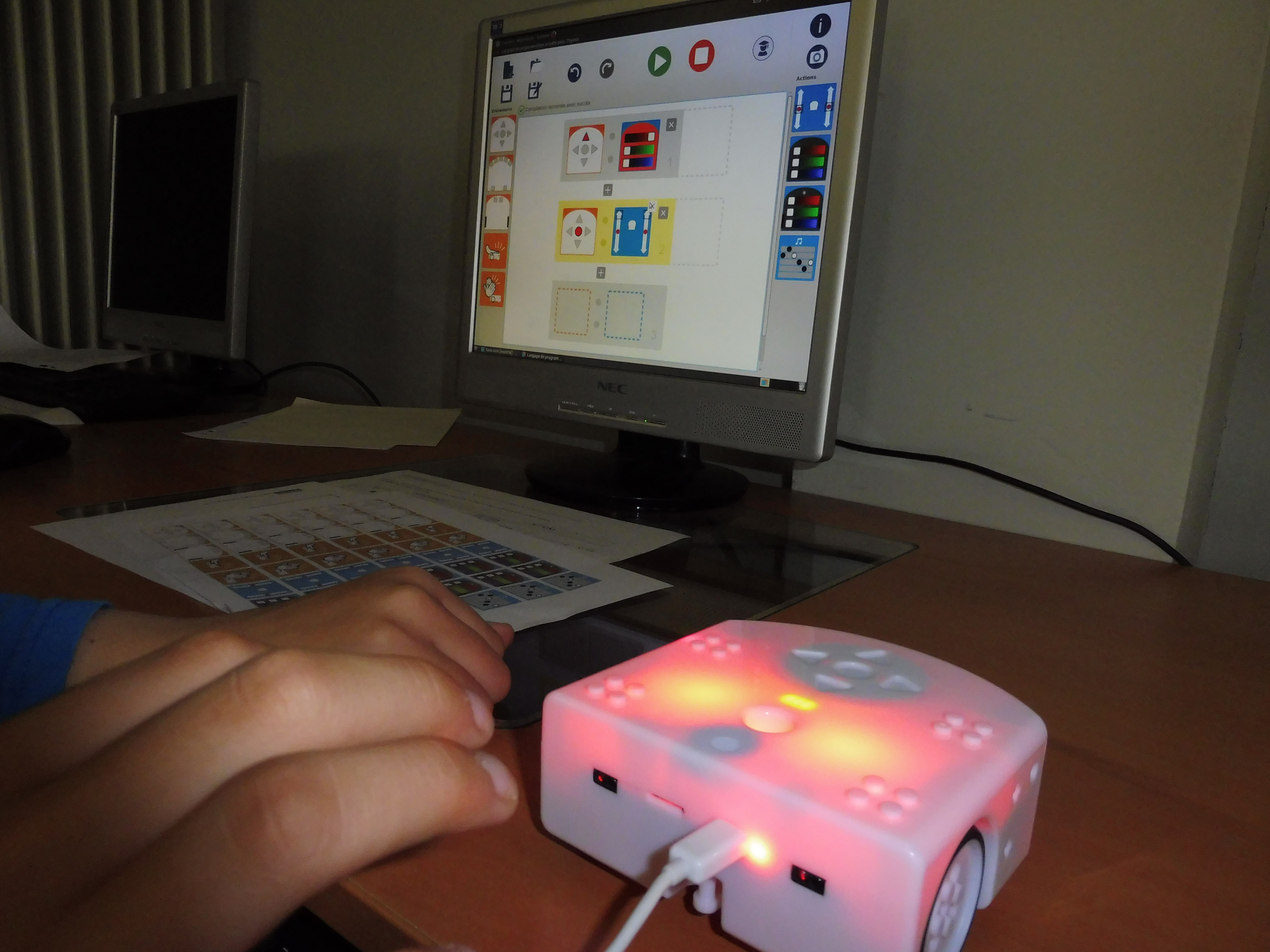 Le robot Thymio au collège calandreta de Montpellierː Voir son propre programme s'exécuter sur le robot !